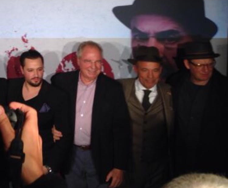 Bogdan Pirnau (außen links), Friedrich von Thun (links), Heiner Lauterbach (rechts) und Nikolai Müllerschön (außen rechts)